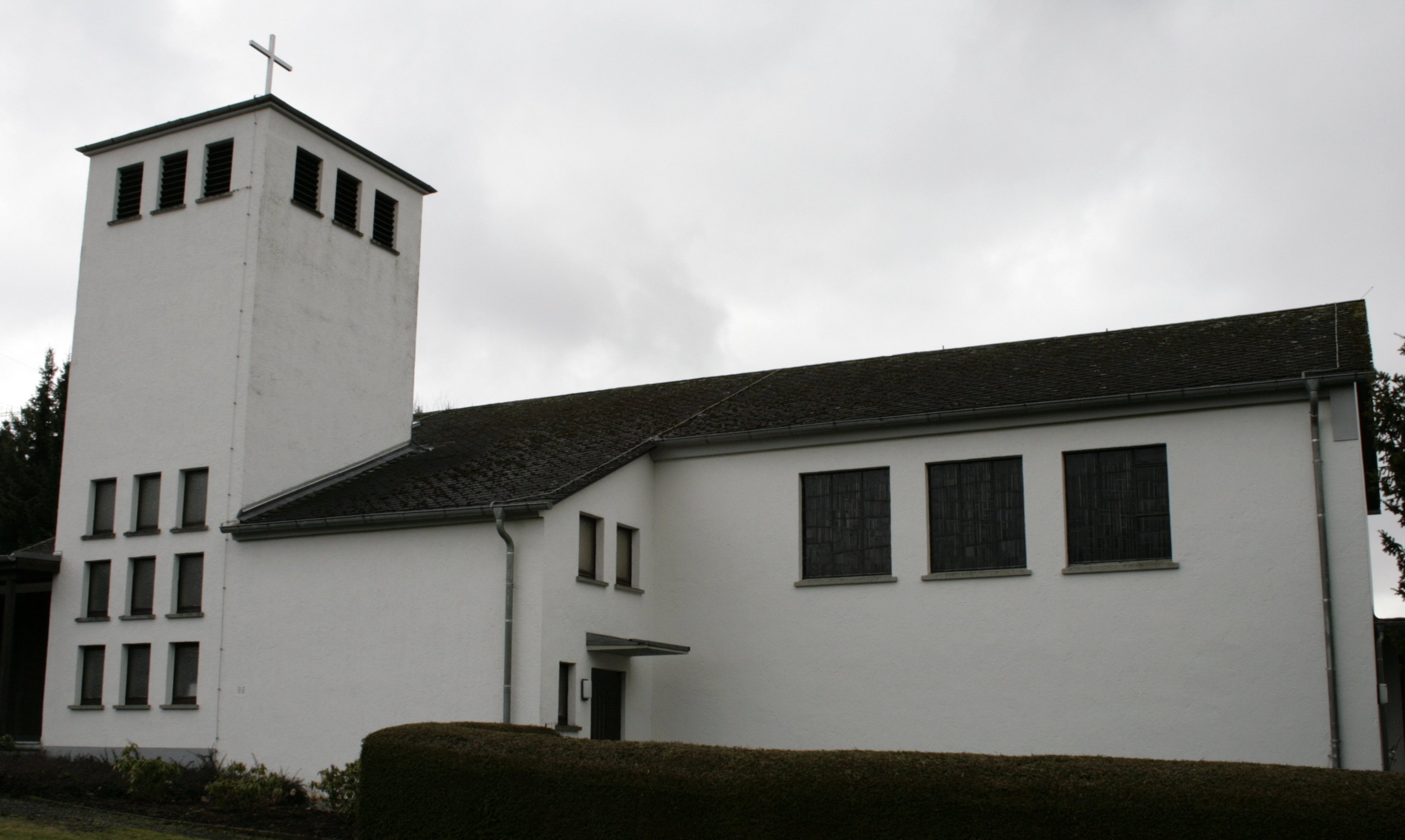 Kirche in Hangenmeilingen, Deutschland